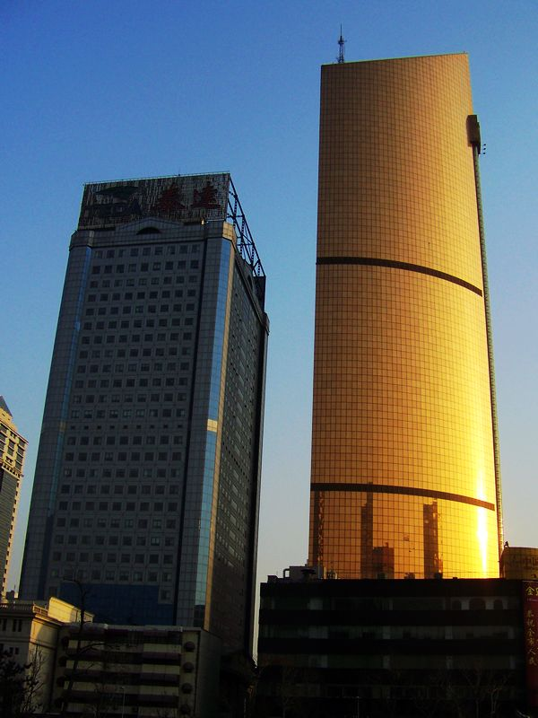 金皇大厦与泰达大厦